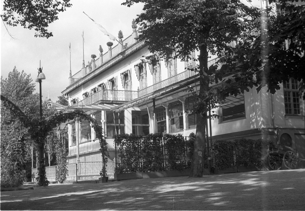 Hasselbacken, Stockholm